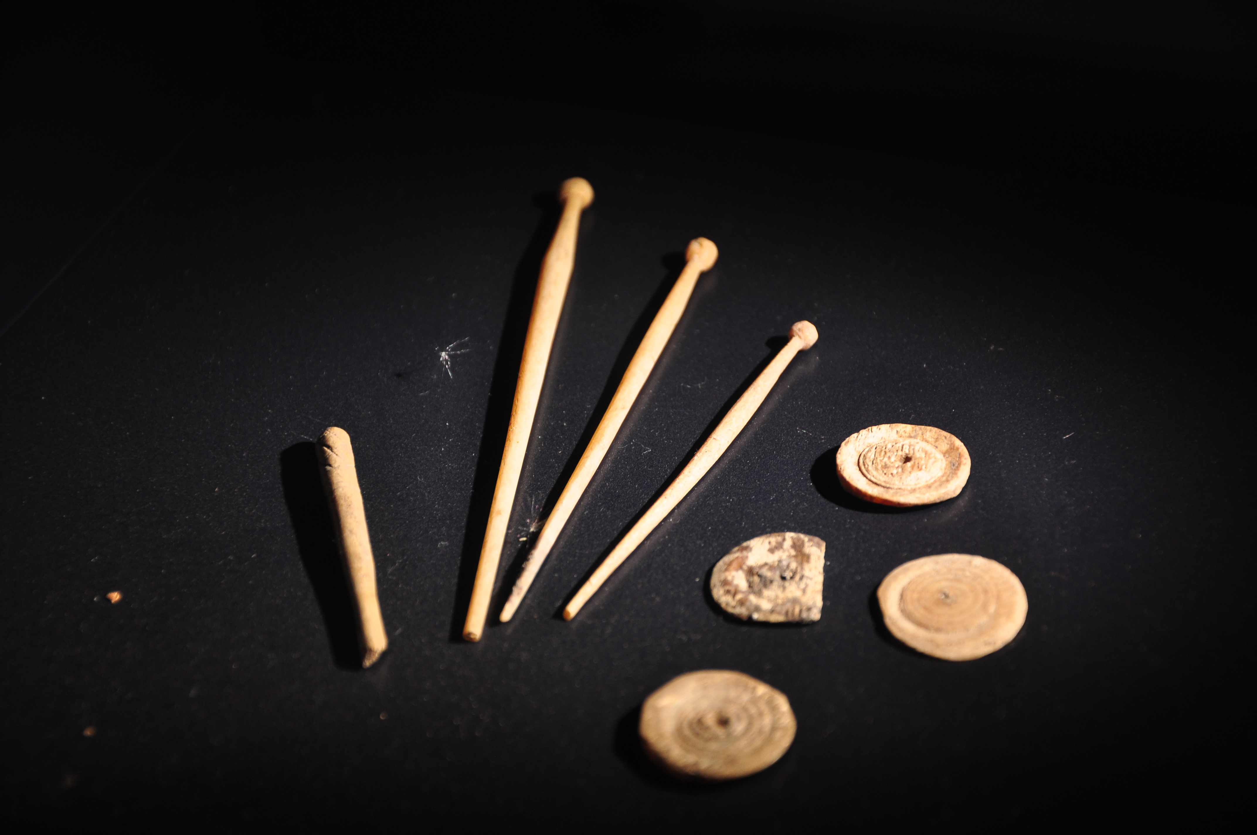 Exponat aus der Thermengasse im einstigen römischen vicus Turicum (Zürich) : Haarnadeln, Schreibgriffel (?) und Spielsteine aus Bein. Die Fundstücke stammen aus Schichten beider Bäder. (gemäss Beschriftung in der Vitrine)